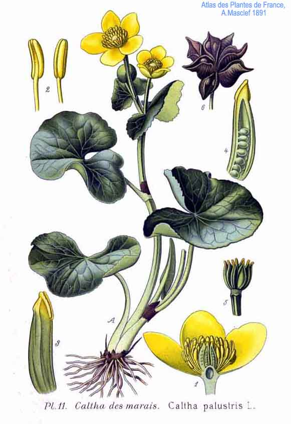 Caltha palustris L.